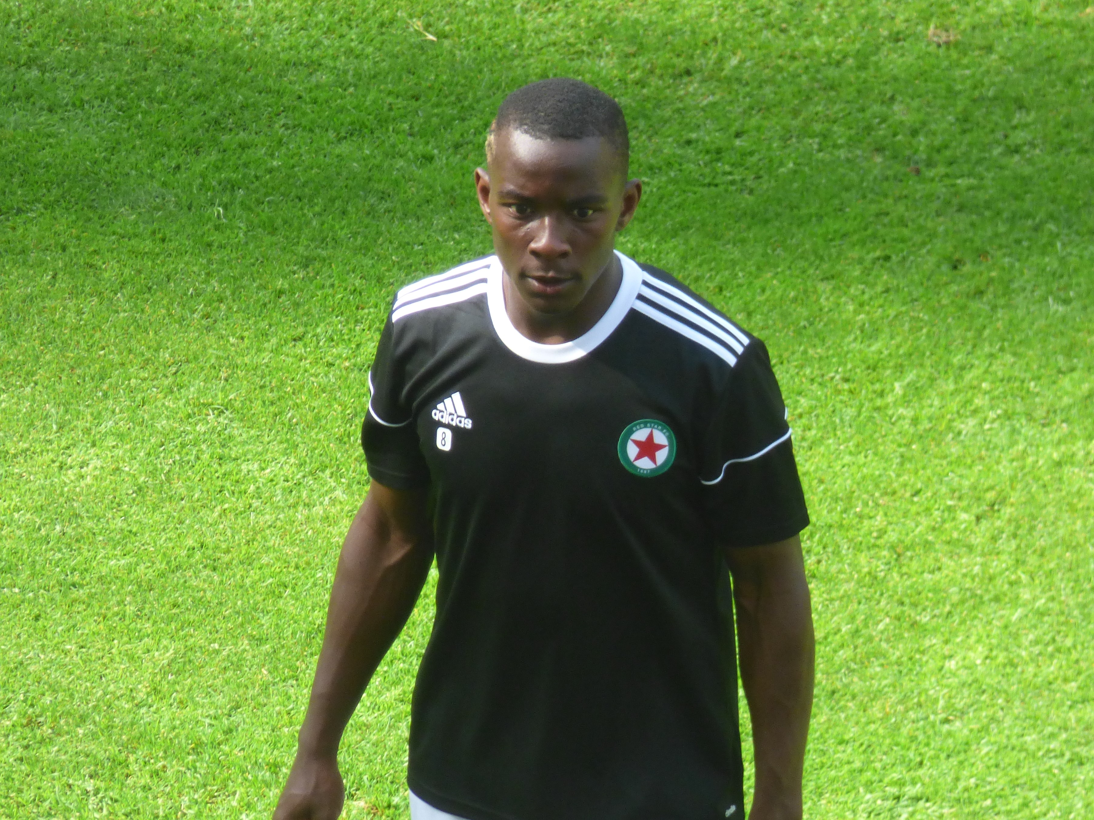 Sekou Baradji avant le match RC Lens / Red Star, comptant pour la deuxième journée du championnat de France de Ligue 2 2018-2019 au Stade Bollaert-Delelis, le 4 août 2018.